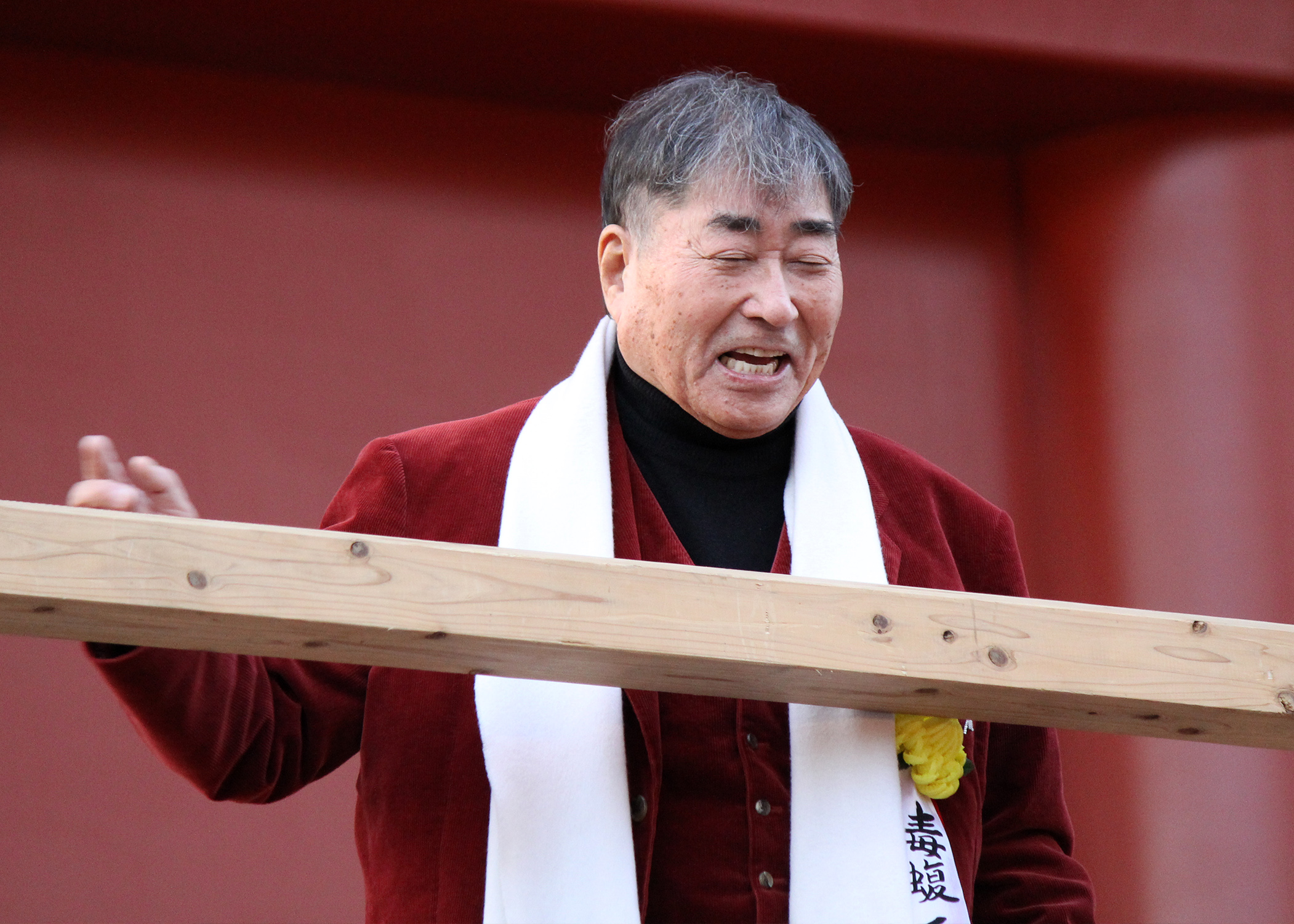 毒蝮三太夫（2016年2月3日・浅草観音文化芸能人節分会にて）